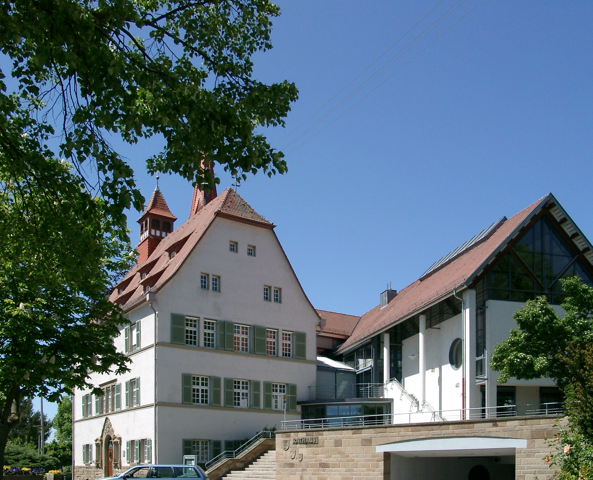 Ilsfeld, Rathaus